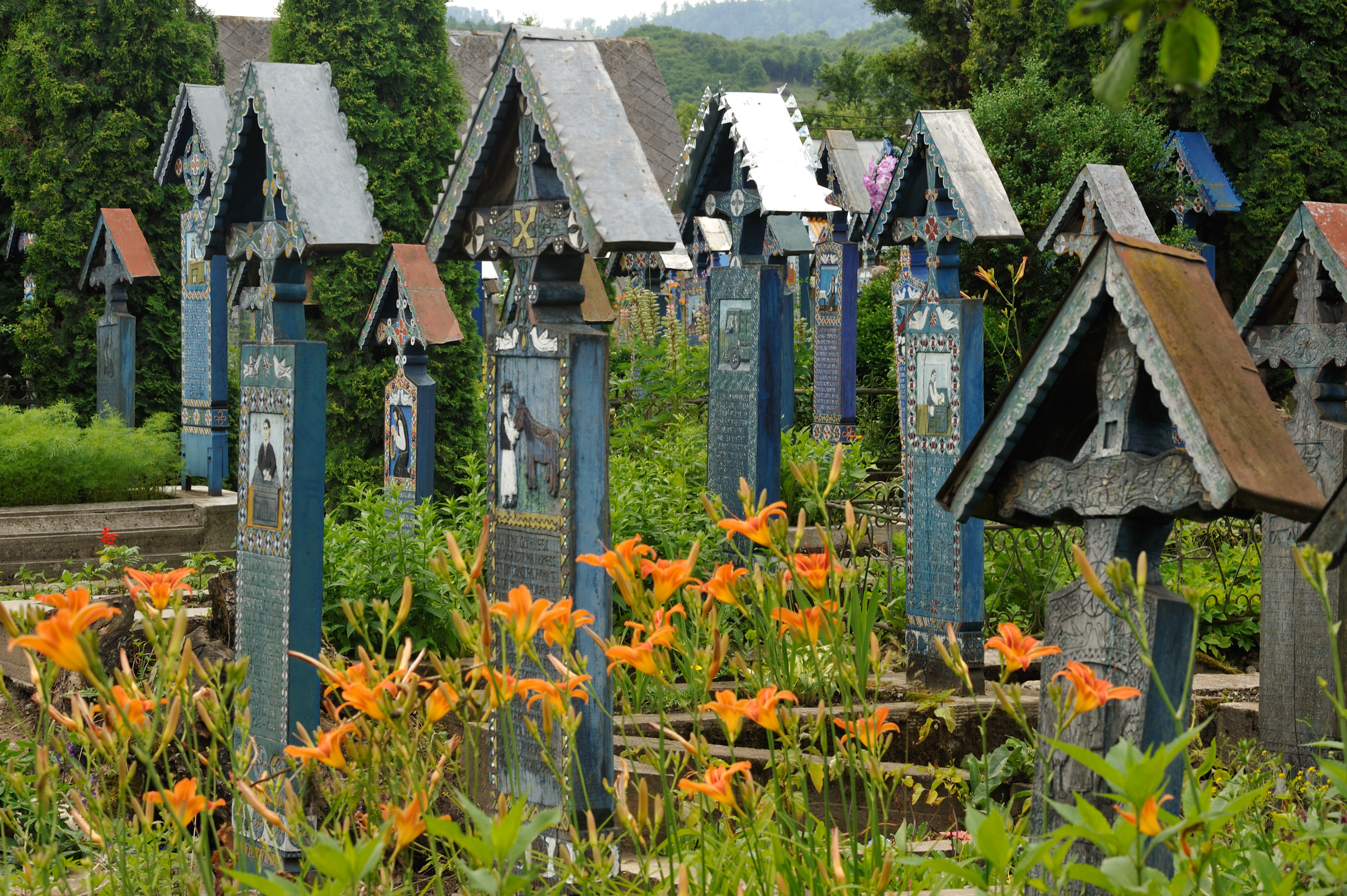 Viele bunte Grabkreuze, die von Hand in Holz geschnitzt, auf bildhafte und unbeschwerte Weise die Todesursache der hier bestatten Menschen farbig illustrieren